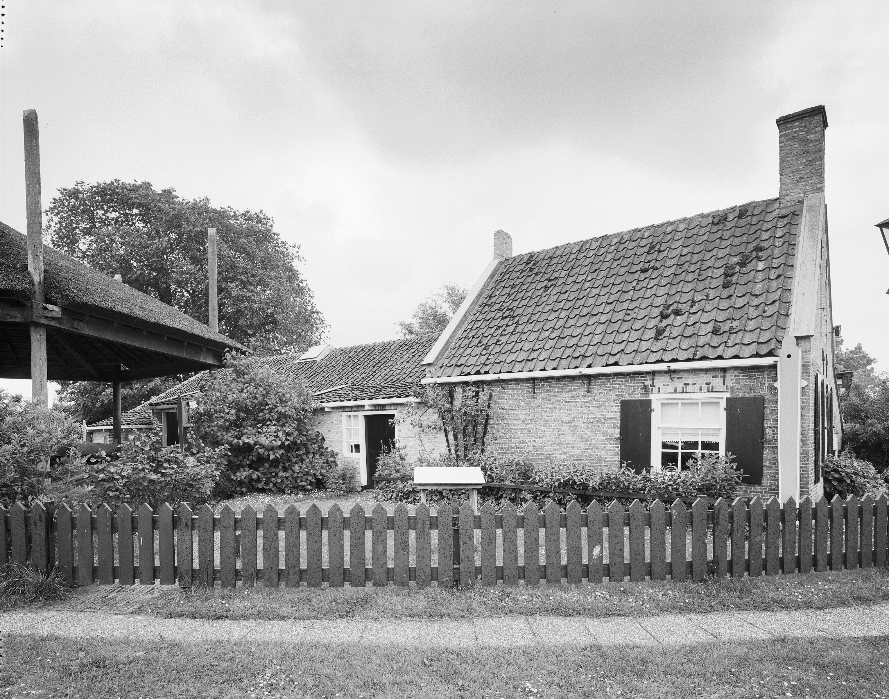 Boerderijen/ Museumboerderij: Overzicht voorgevel en linker zijgevel, boerderij, thans museumboerderij (opmerking: Gefotografeerd voor Monumenten In Nederland Friesland, bladzijde 305)